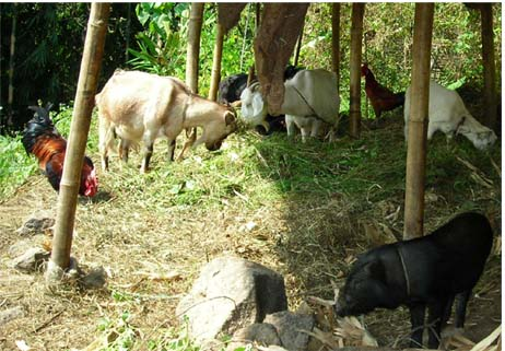 नेपाली: एउटै गोठमा धेरै किसिमका पशुप‌ंक्षीहरू।